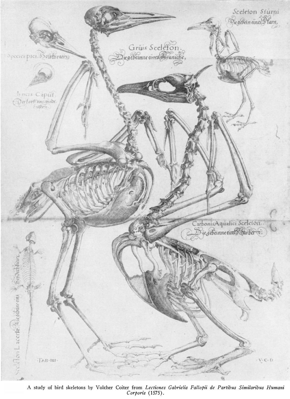 Sketch of bird anatomy by Volcher Coiter Species pici - Ho?stbraer? = Picidae sp. ?yncis Caput - Der Kopf eines winde Falkere = Falconidae sp. Grus Sceleton - Die Gebeine eines Kraniche = Grus grus skeleton Sceleton Sturni - Die Gebeine eines Starn = Sturnus vulgaris skeleton Carbonis aquialici Skeleton - Die Gebeine eines Scharber = Phalacrocorcidae sp.